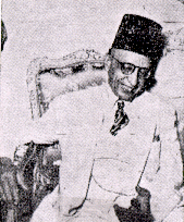 أحمد نجيب الهلالي رئيس وزراء مصري في عهد الملك فاروق